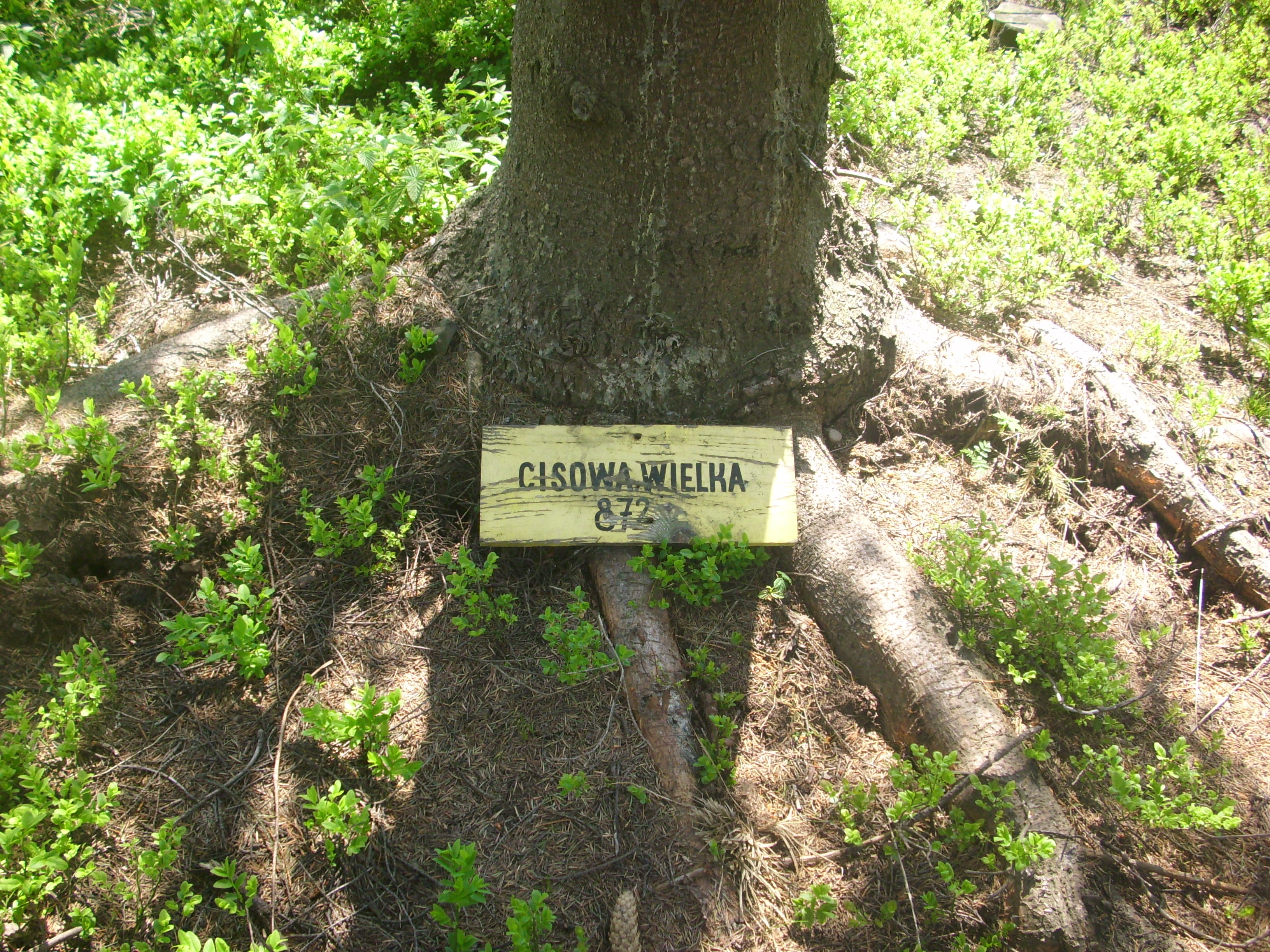 Szczyt Wielkiej Cisowy 872 m n.p.m. w Brennej